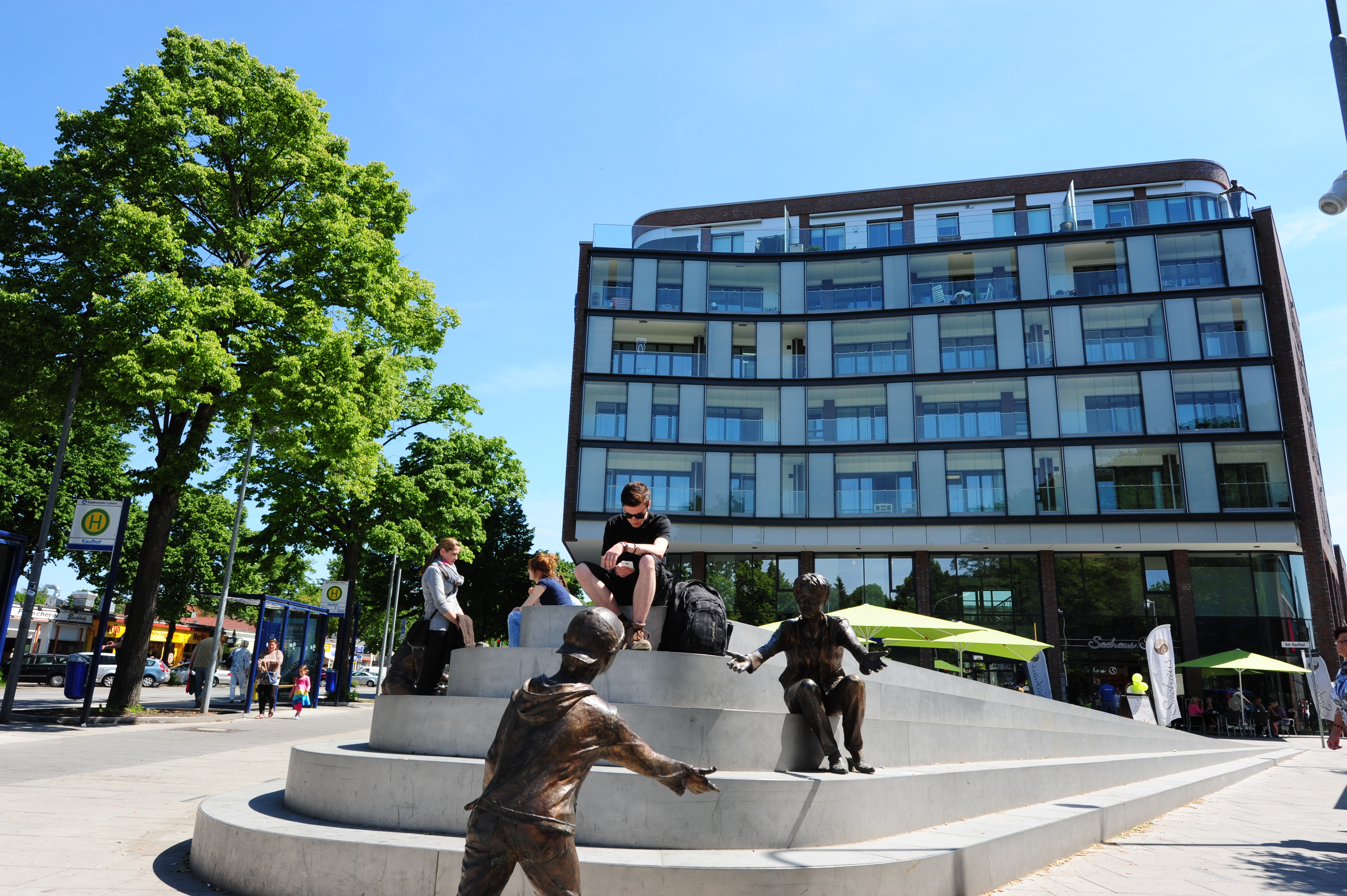 Am 6.12.2012 weihte die NEUE LÜBECKER Norddeutsche Baugenossenschaft 13 lebensgroße Bronzefiguren ein. Sie stehen am neuen Kaufhof und geben dem Gebiet nun ein eigenes Gesicht.